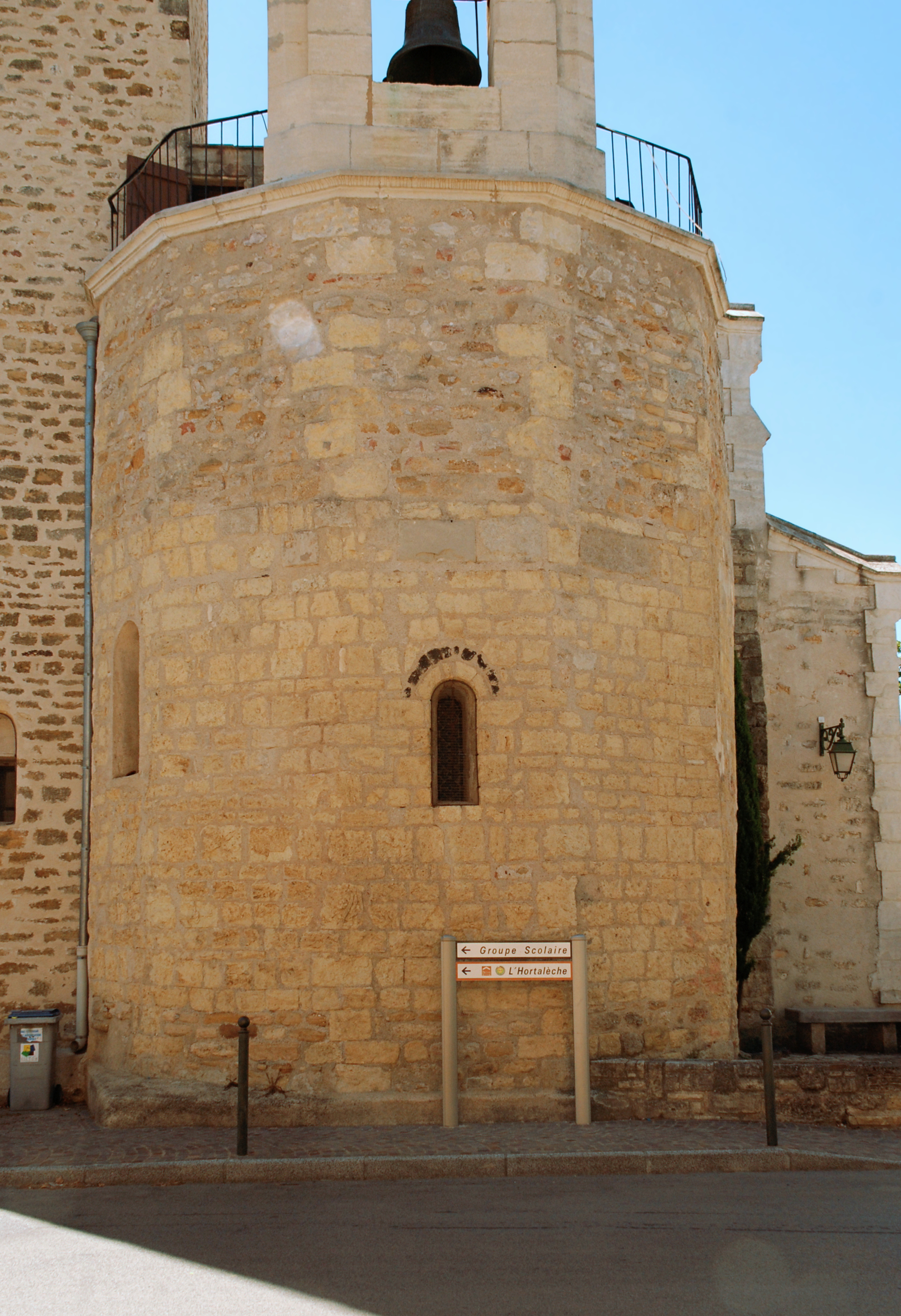 France - Languedoc - Hérault - Lieuran-lès-Béziers - église Saint-Martin